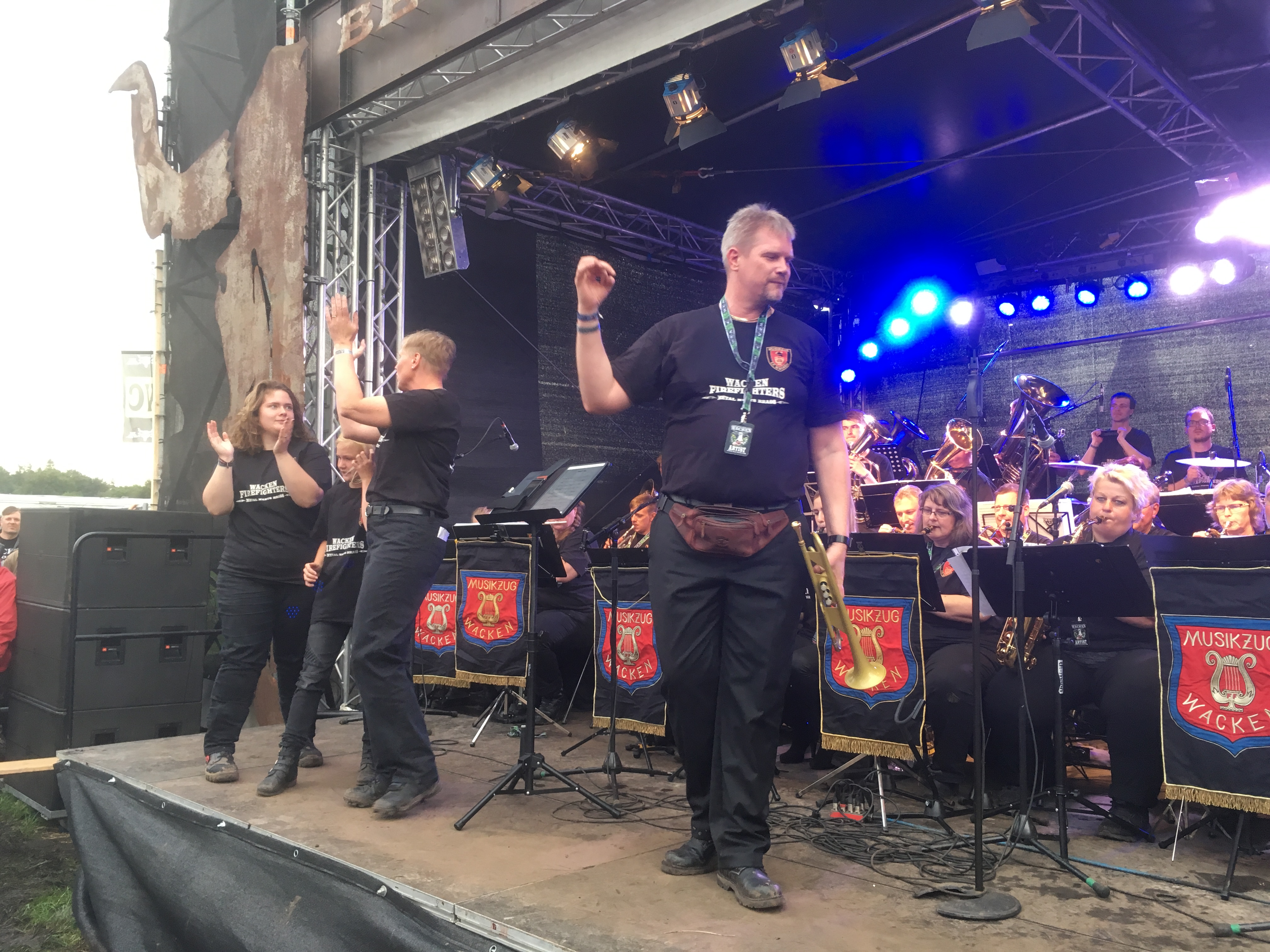 Wacken Firefighters auf der Beergarden-Stage WOA 2016